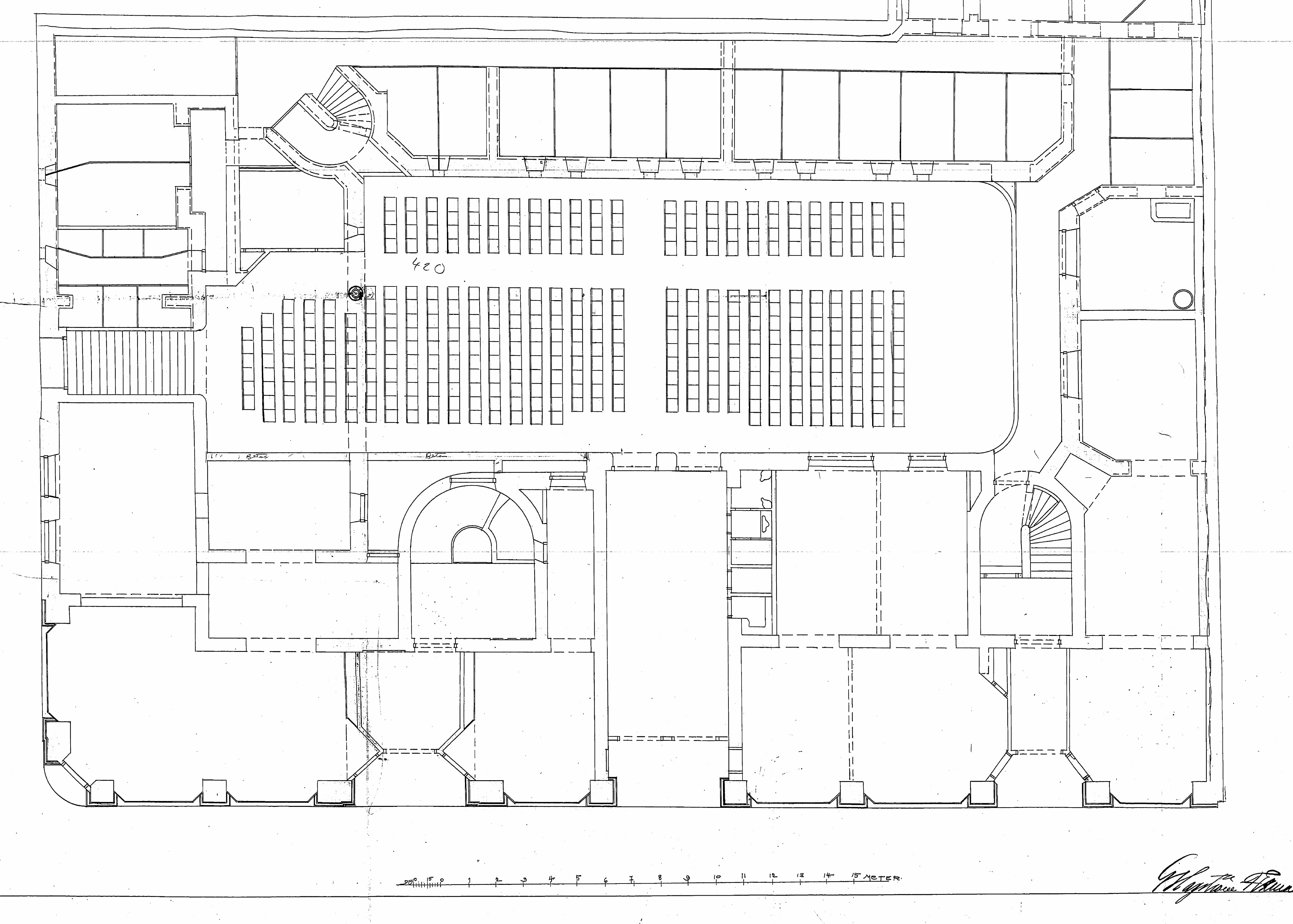 Biografsalongen Götiska teatern, Götgatan 11-13